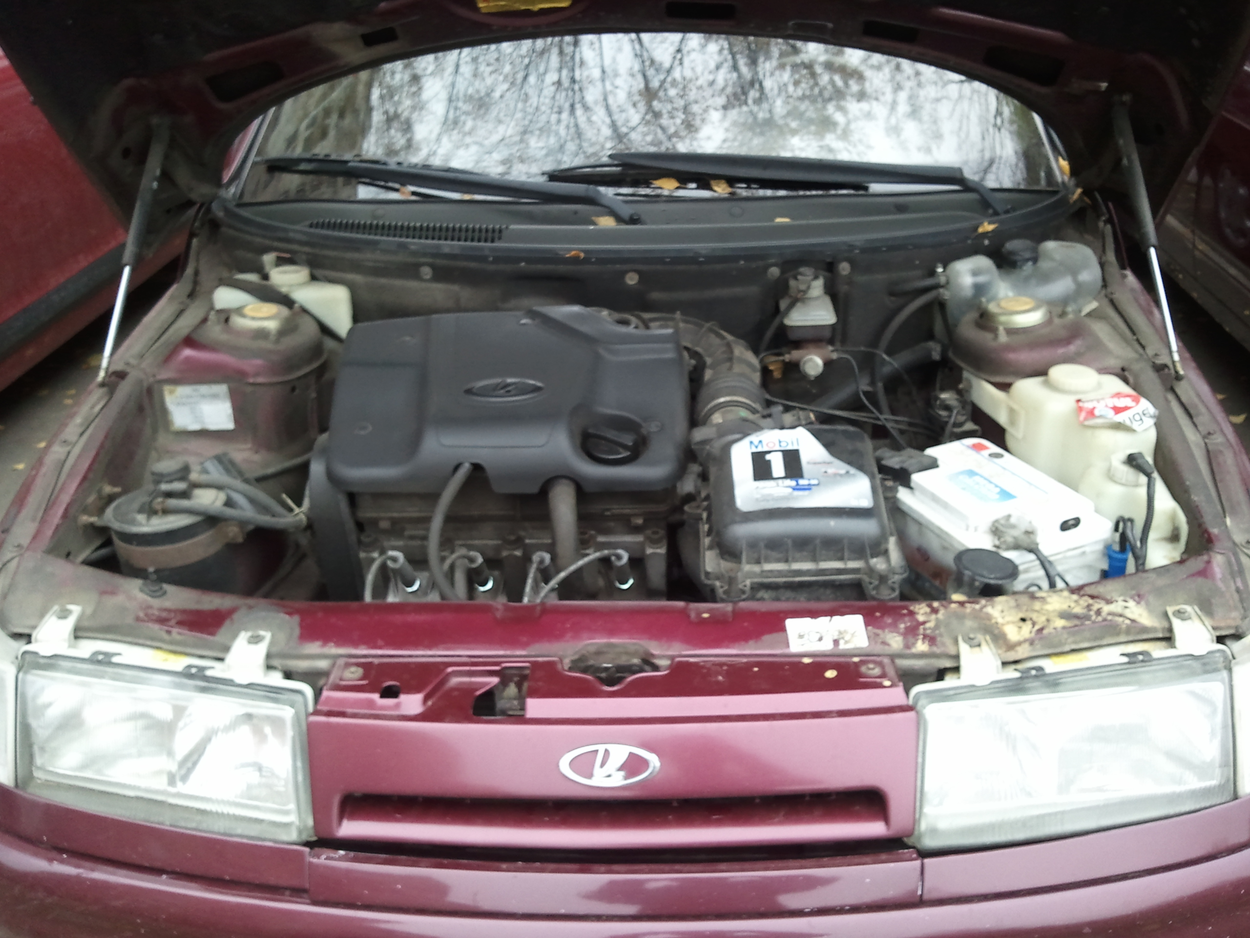 ВАЗ 21112 (2005), двигатель 1,6 (8 кл.)